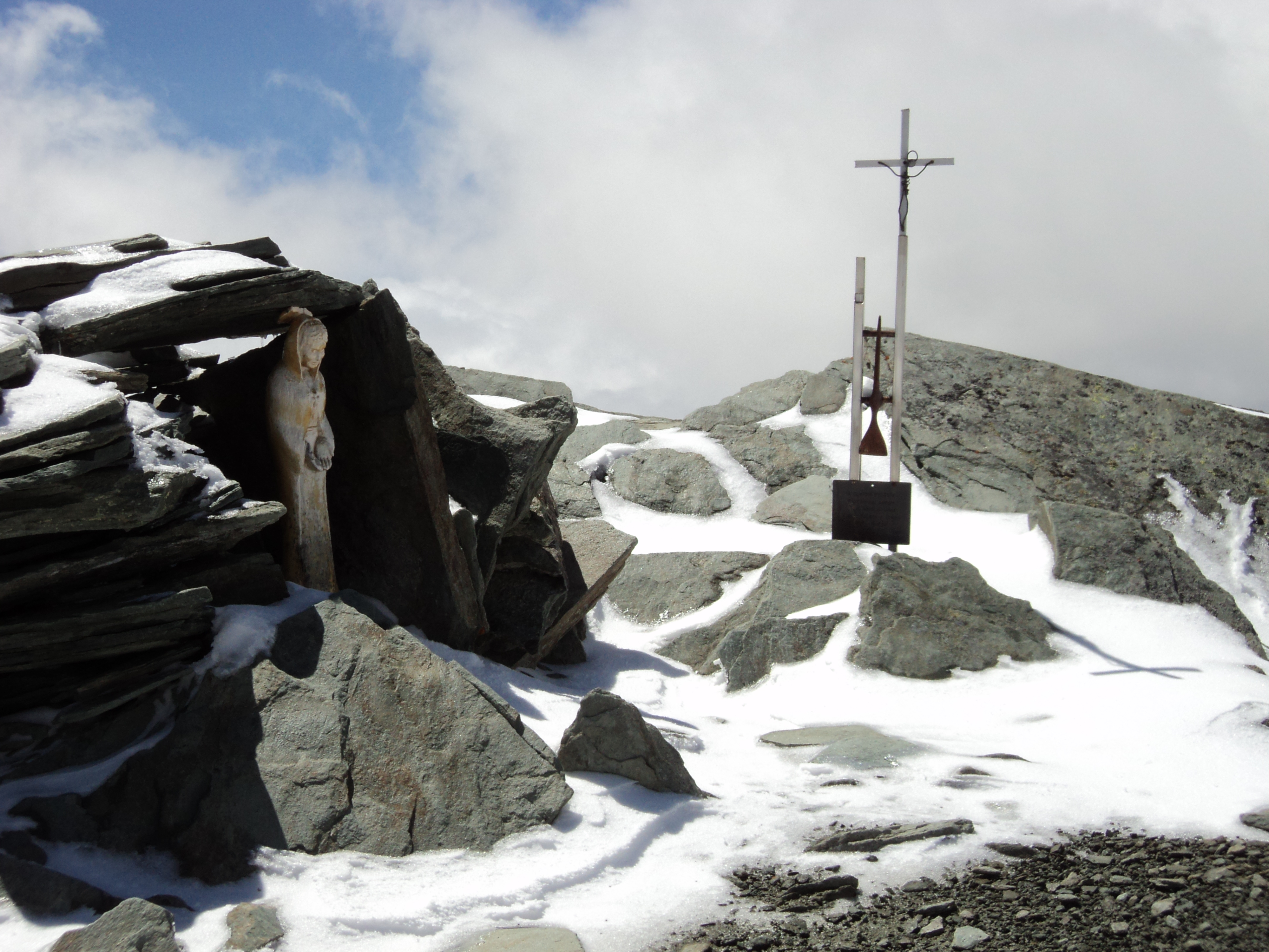 Vetta della Punta Rossa della Grivola. Massiccio del Gran Paradiso.